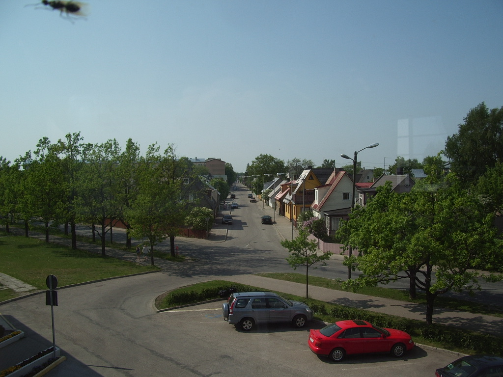 Tammsaare street, Pärnu town